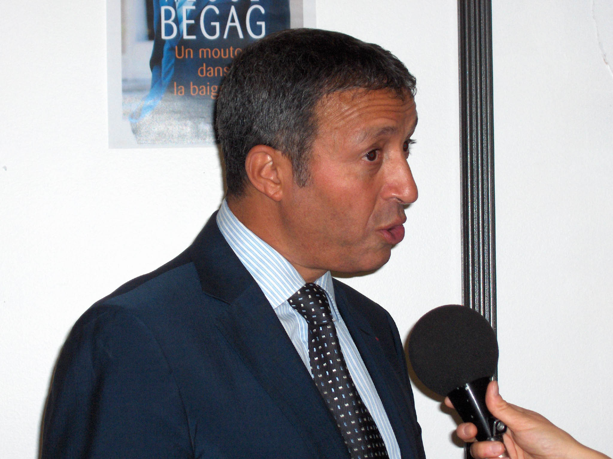 Azouz Begag, président du 18ème Festival international de géographie de Saint-Dié des Vosges